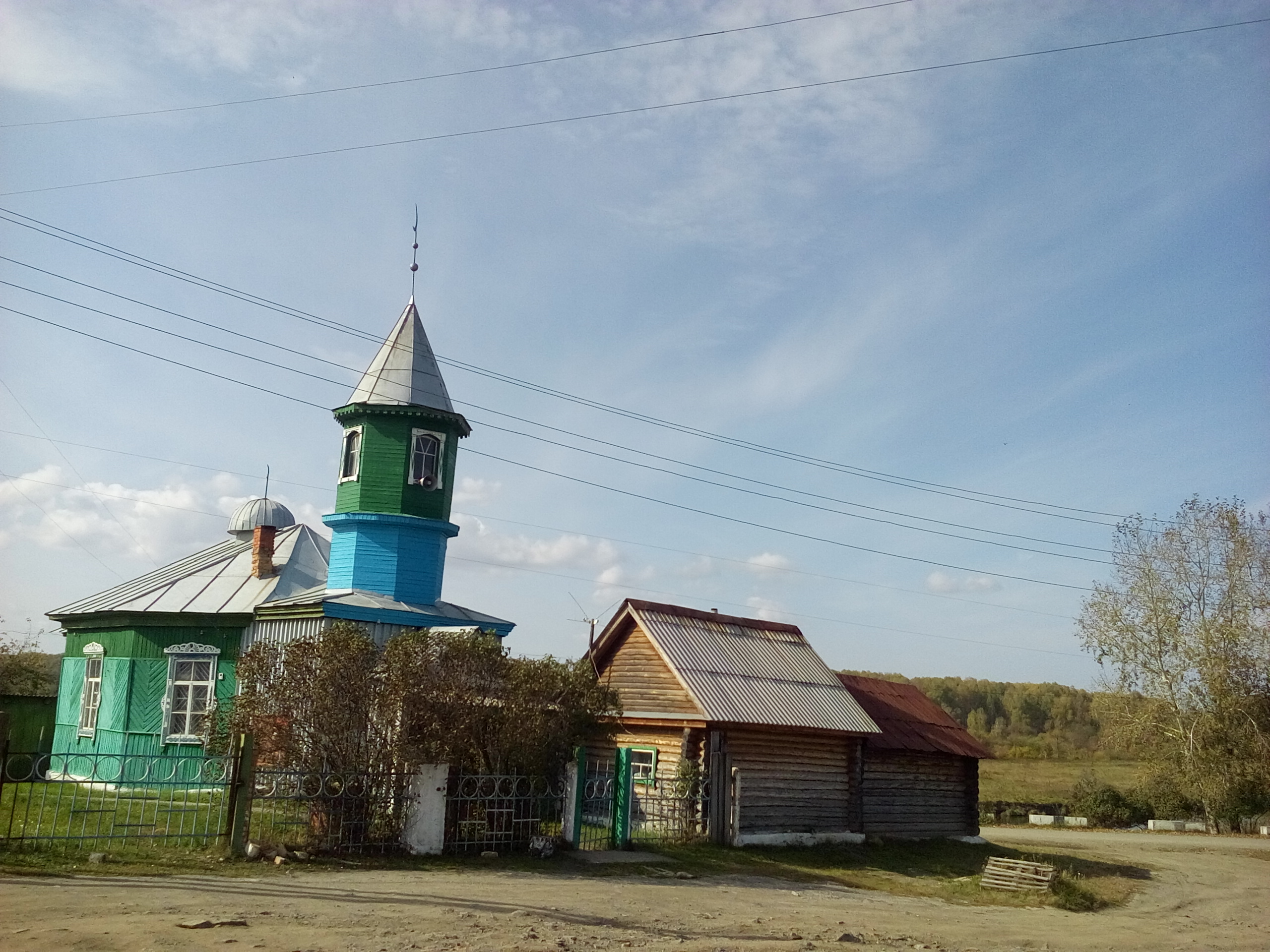 Мечеть: улица Советская, 3, Кулуево, Аргаяшский район, Челябинская область